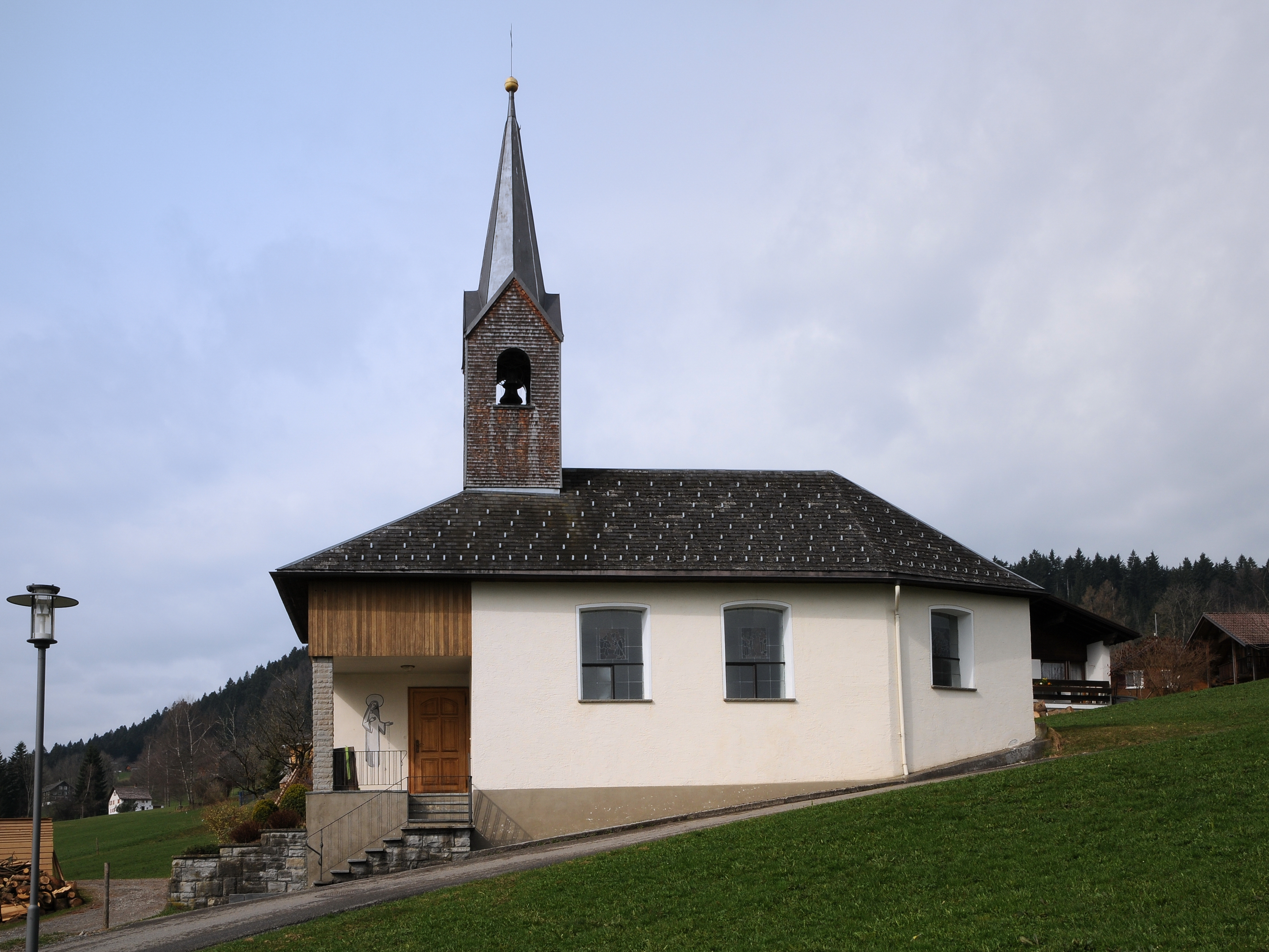 aus dem DEHIO Vorarlberg 1983: Kapelle "Zu den Sieben Schmerzen Mariens", in Fischbach (Alberschwende). 1876 erbaut, 1878 geweiht 1966/67 erweitert. Rechteckbau mit Chor unter Satteldach, Glockenturm mit Spitzhelm, Anbau mit Walmdach. An der Eingangswand Sgraffito hl. Maria, bezeichnet B 1966 (Schuldirektor Barta). Rechteckiger, tonnengewölbter Betraum, Flachbogenfenster, eingezogener Chorbogen, 3/8 - Chor mit hohem Gewölbe, umlaufendes Holzgesims, im Westen neue Empore. - Glasgemälde von 1876, Flucht nach Ägypten, Darbringung im Tempel, trauernde Maria am Grabe, Kreuzigung mit Hll. Maria, Johannes und Magdalena, Kreuzgang, hl. Maria begegnet Christus. - In der Altarwandnische Figur Pietà, Erstes 19. Jh.